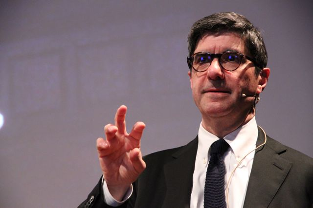 Le cose che ho imparato (Mondadori, 2011) di Gianni Riotta Come Pirandello e Vittorini, Gianni Riotta parte un giorno dalla natia Sicilia, perché "per vivere occorreva andare via". È questa la prima tappa coraggiosa di un'avventura personale e professionale ricchissima, che ha le sue radici nell' "Isola" e che lo porterà poi in paesi remoti, facendogli incrociare i protagonisti della storia del Novecento.